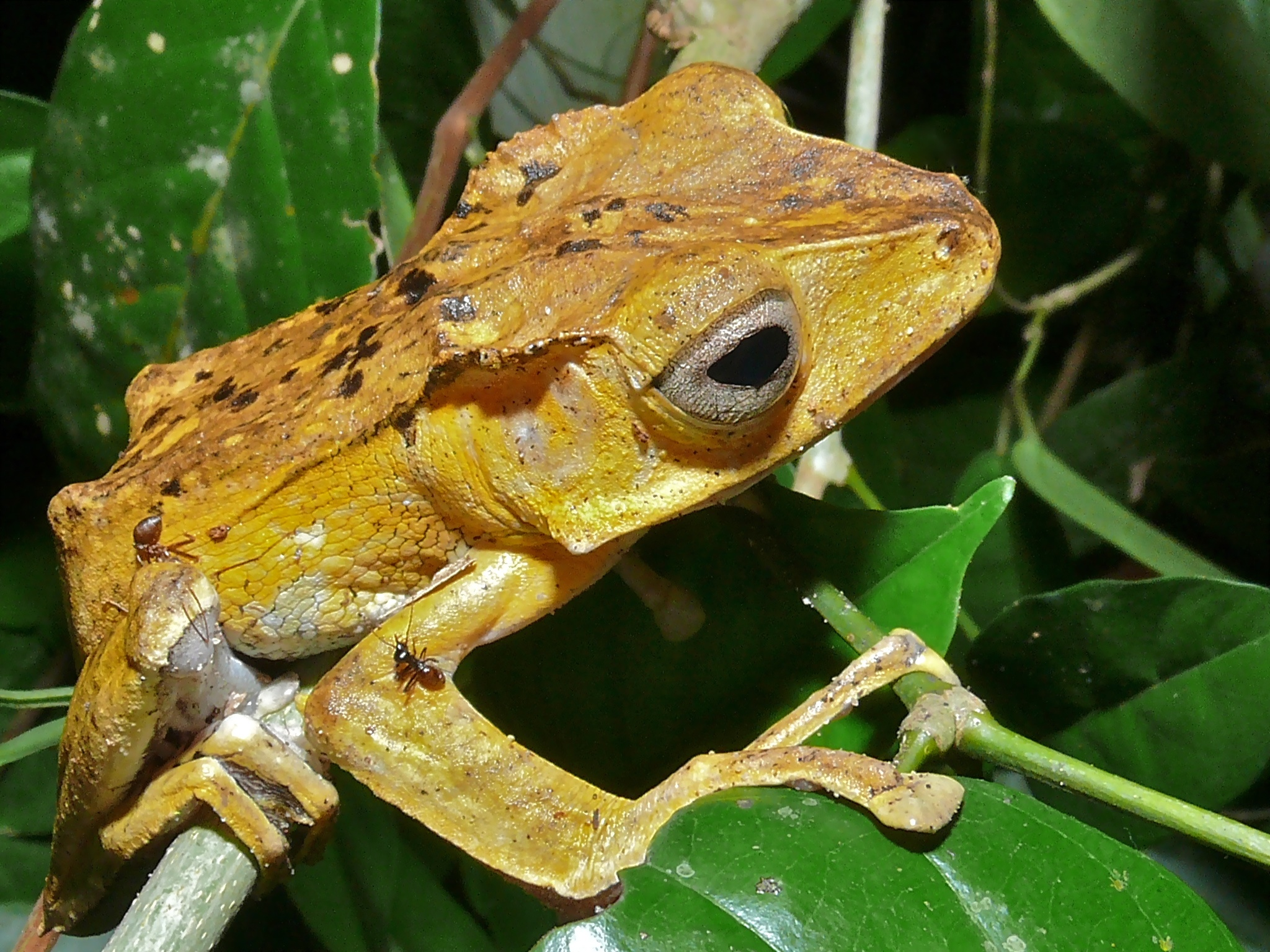 Lambir Hills NP, Sarawak, MALAYSIA